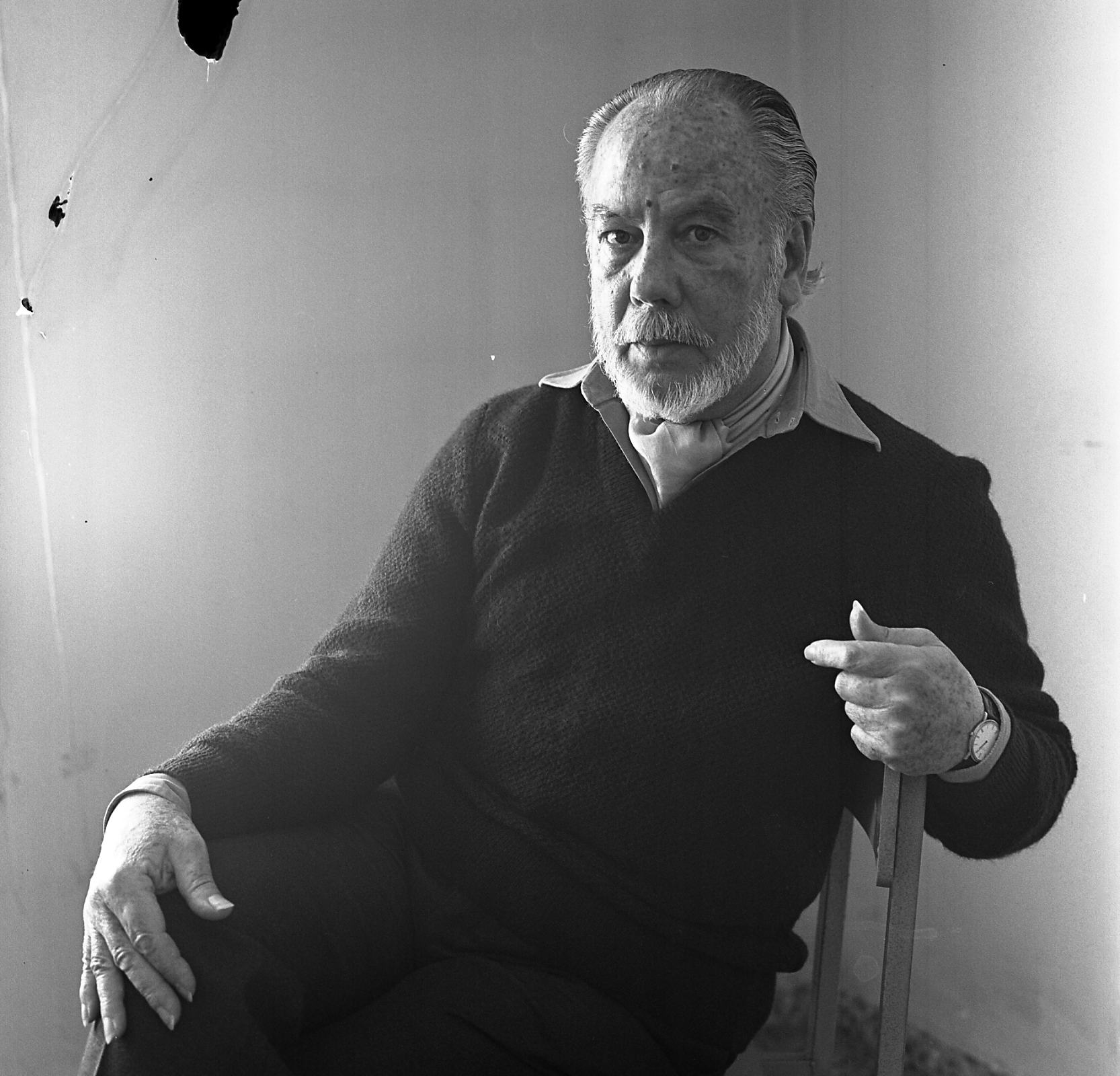 Primeras fotos, Murcia, 1979.